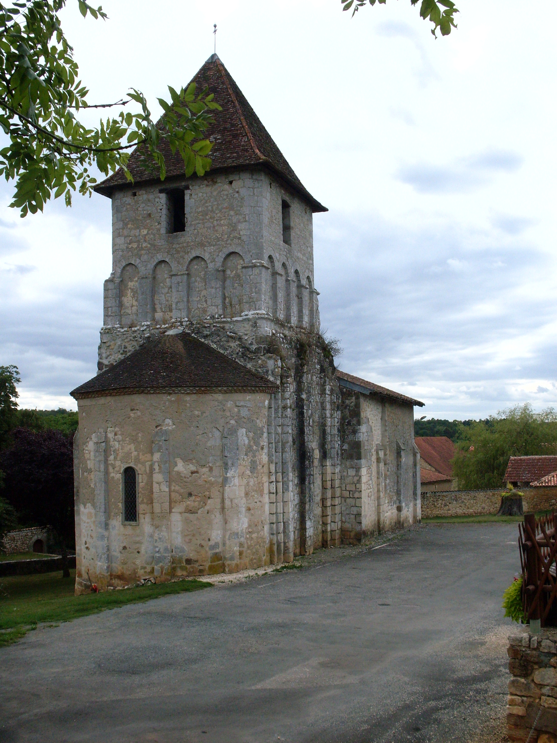 église de Saint-Martin-le-Pin, Dordogne, France Object location45° 33′ 20″ N, 0° 36′ 44.1″ E